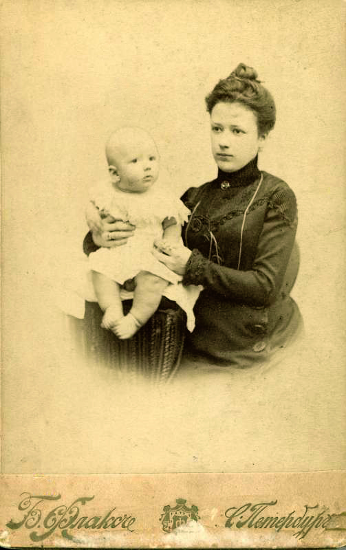 Жена В. К. Арсеньева Анна Константиновна с сыном Володей (Волей). Санкт-Петербург, предположительно 1901 год